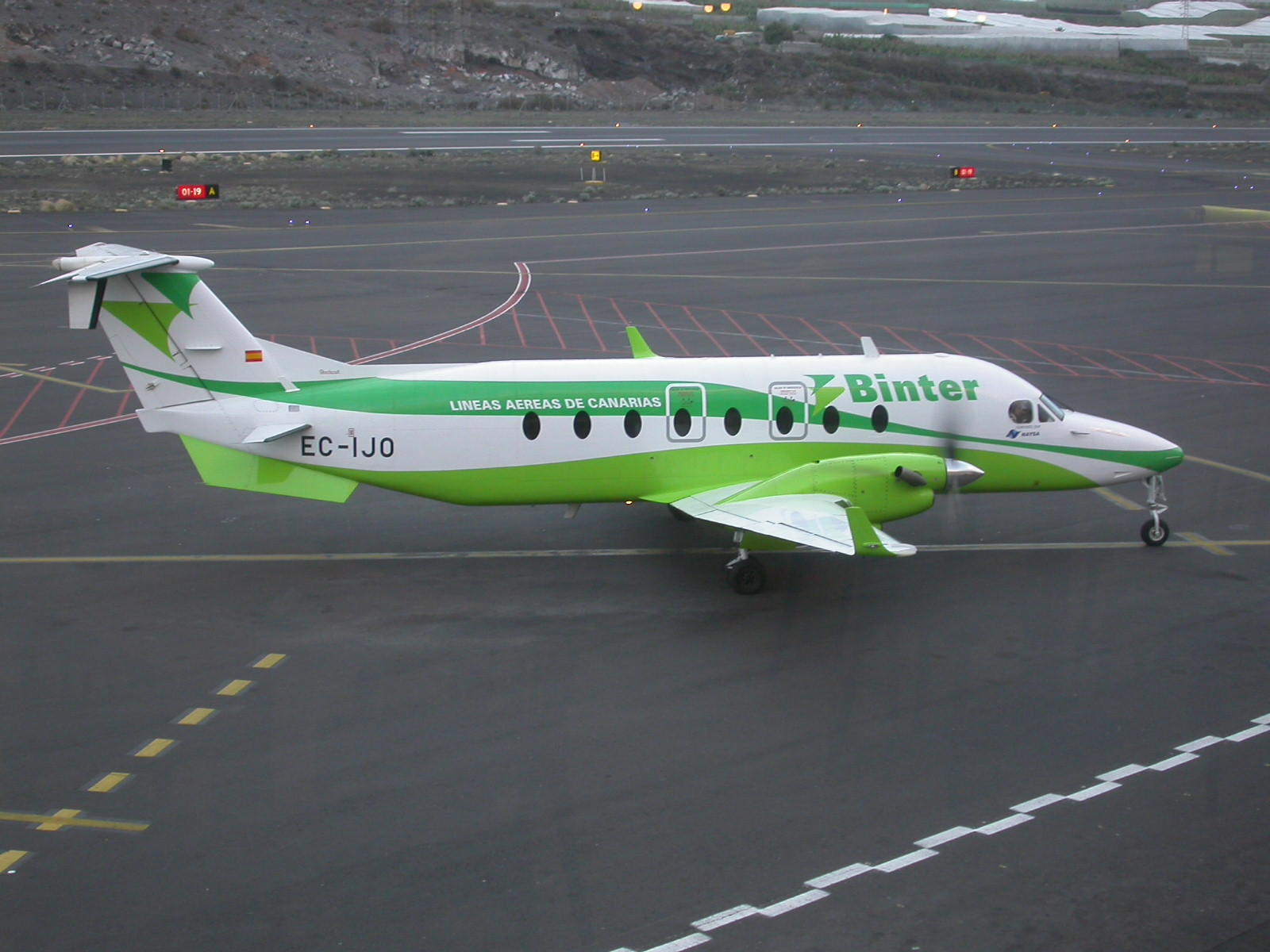 Beechcraft 1900D de la compañía Binter Canarias en el Aeropuerto de La Palma.